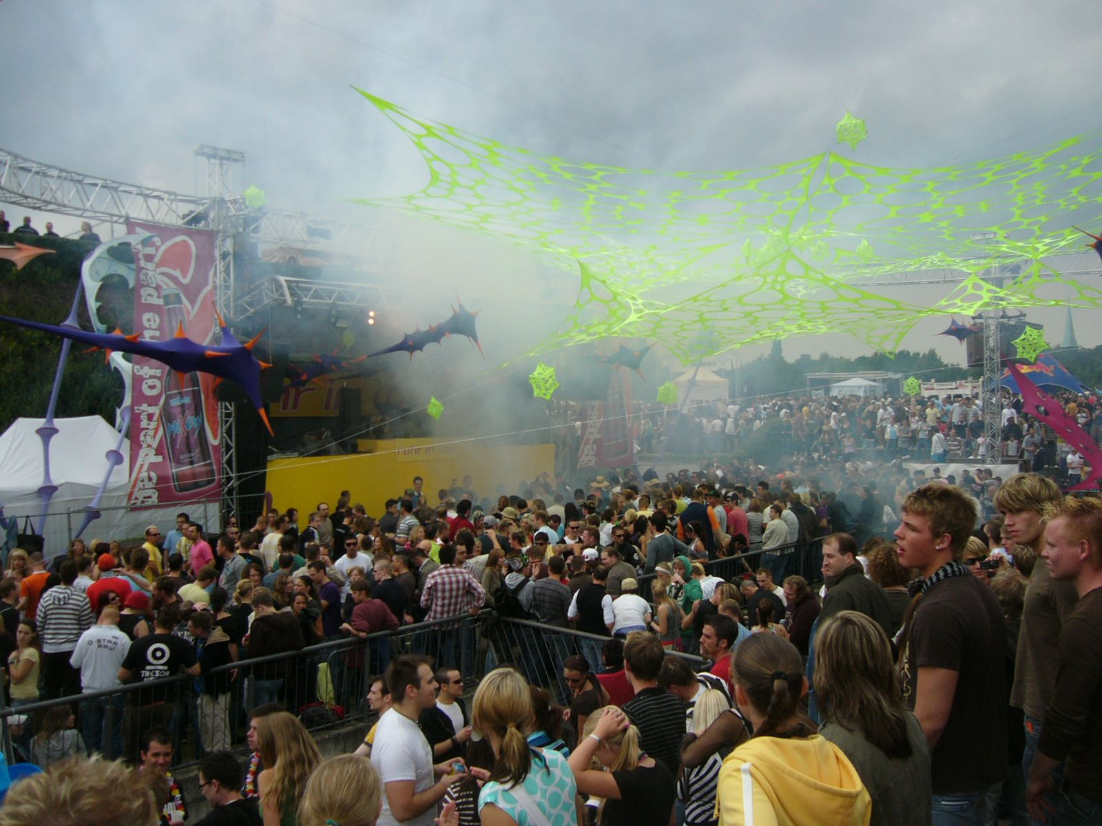 gecco meet "ruhr in love"